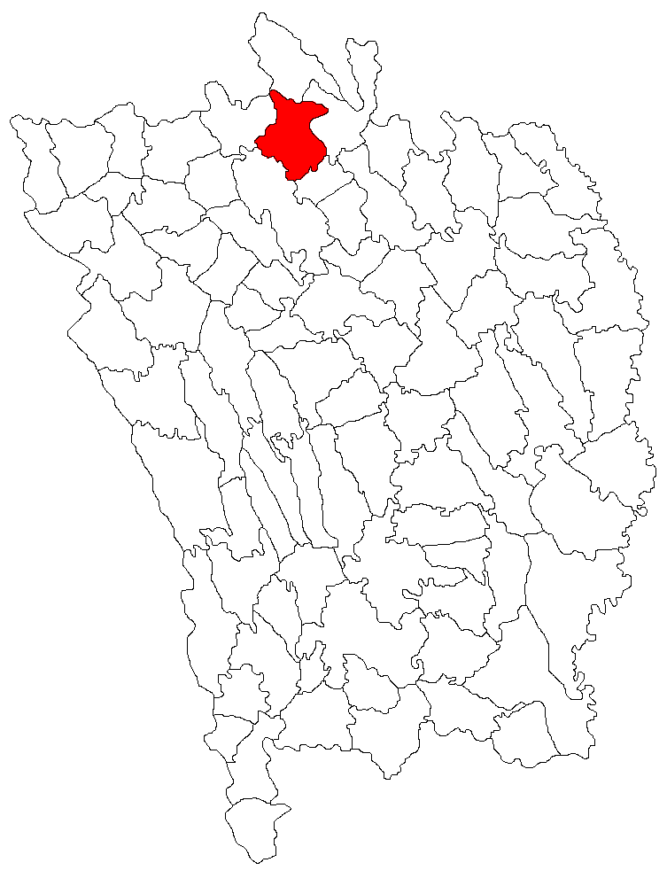 Categorie:Hărţi ale judeţului Vaslui